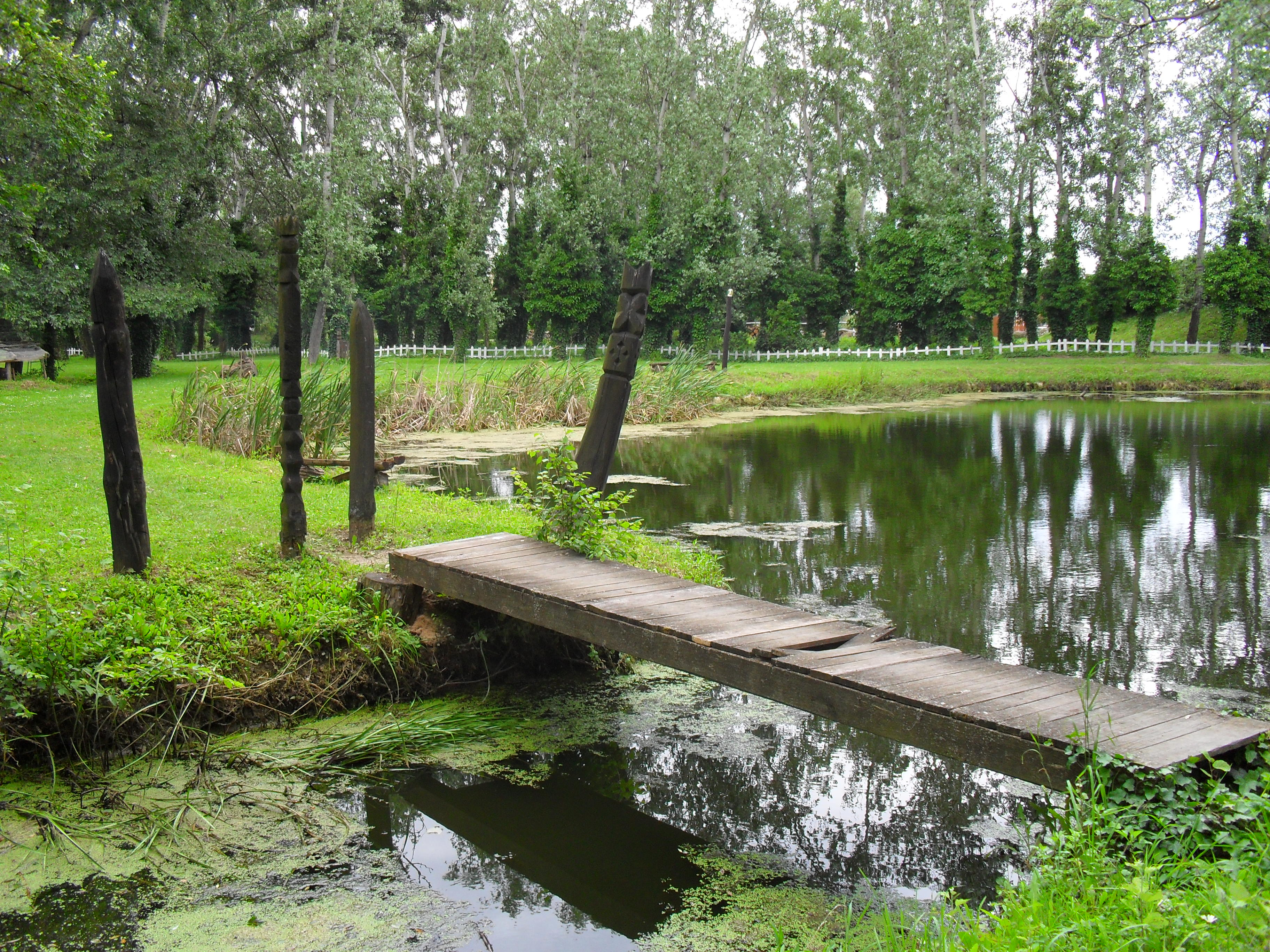 Martos - Feszty Park